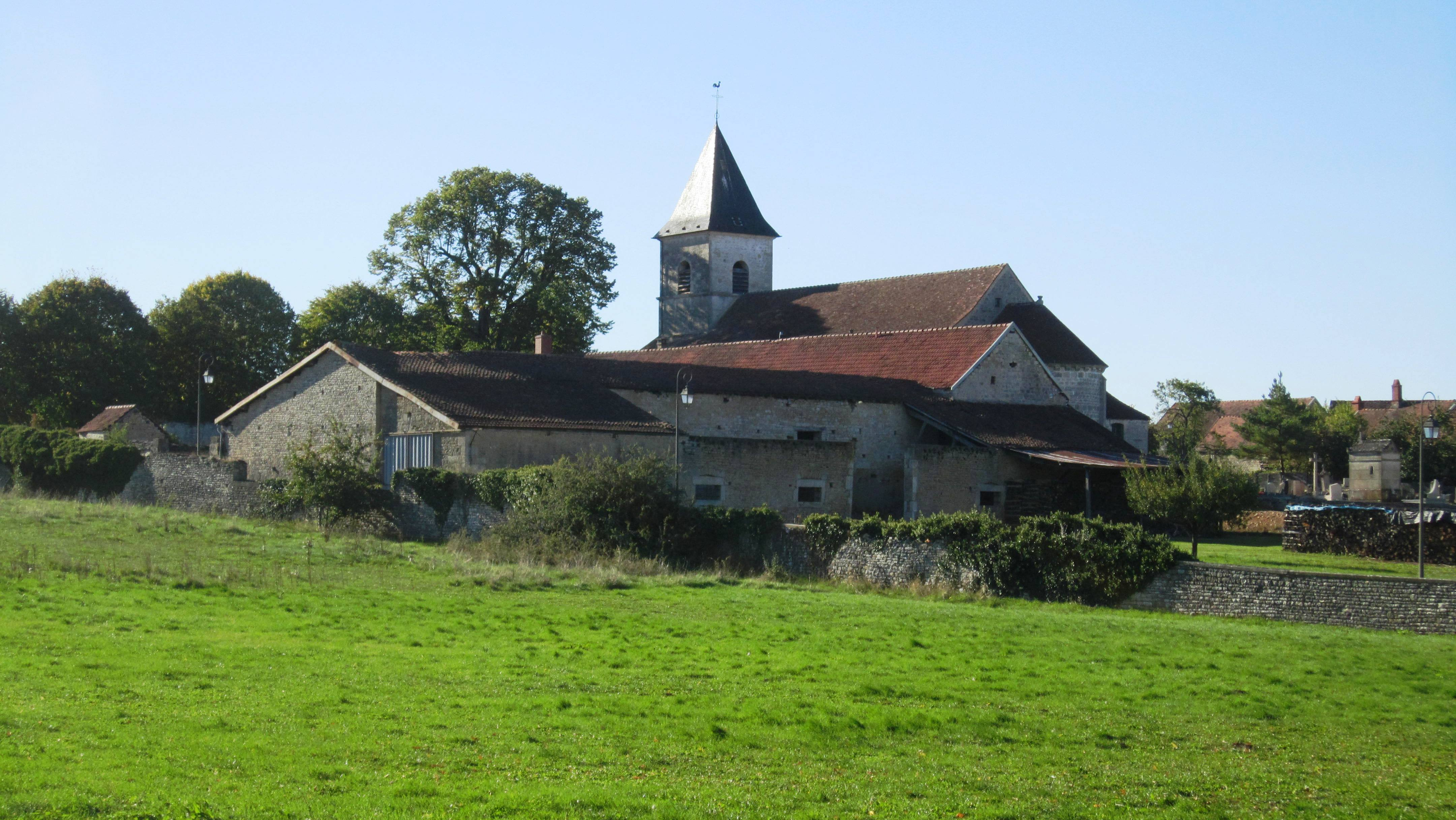 Puits (Côte-d'Or)